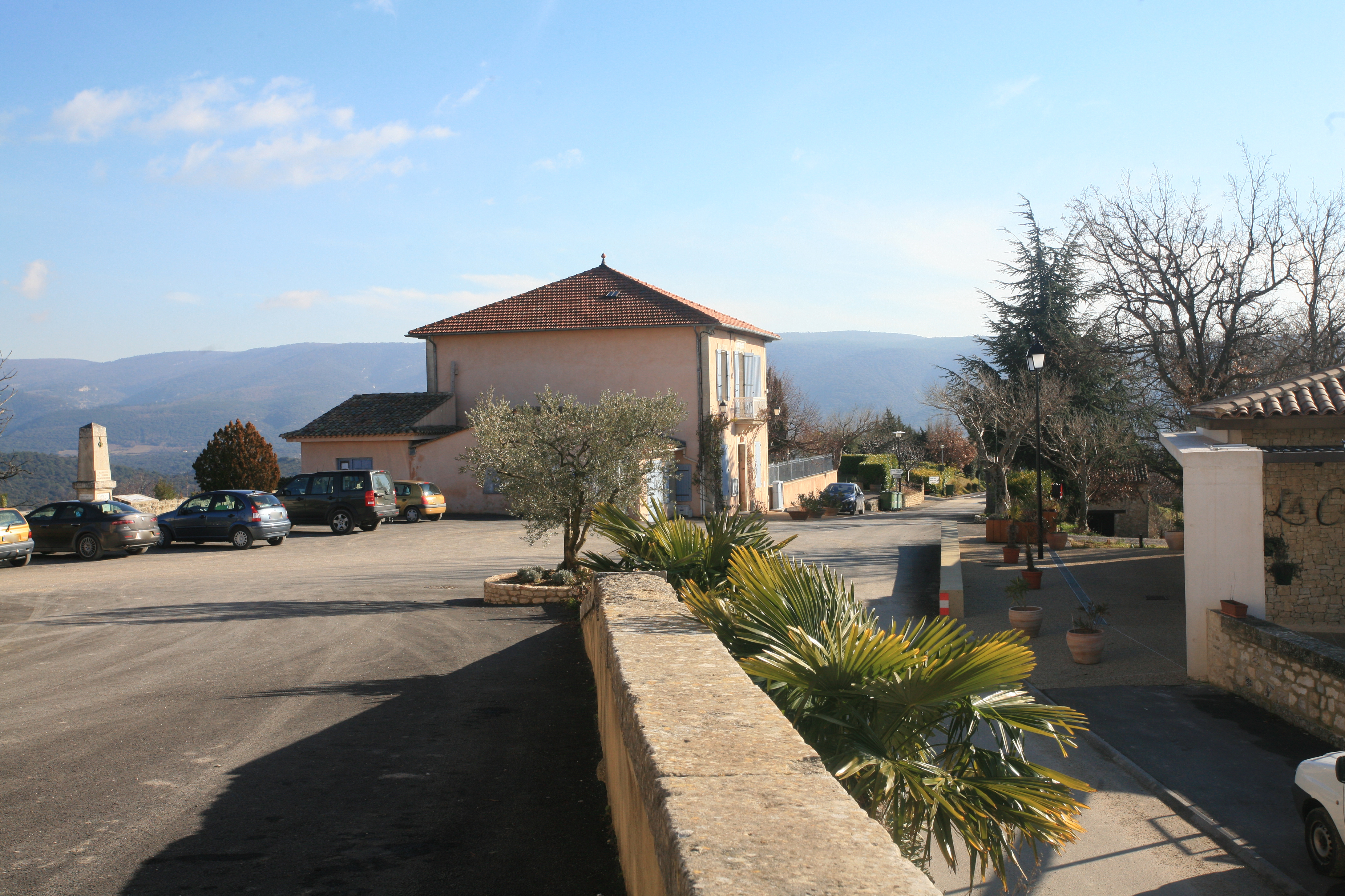 Mairie de Blauvac, France